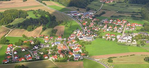 Ortsteil Schwend, Birgland